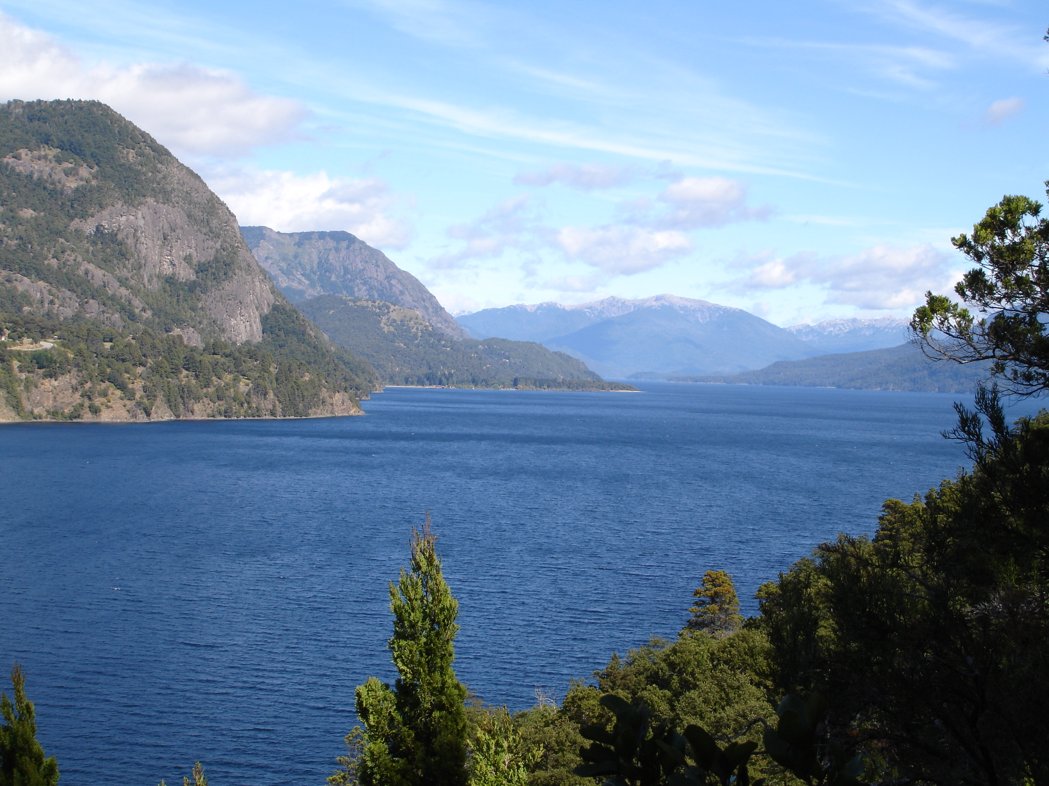 Vista del Lago Lácar desde el mirador Bandurrias.